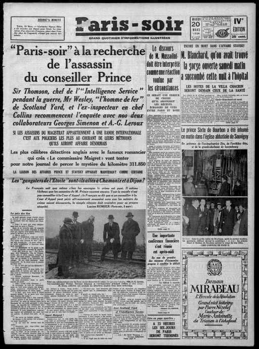 Le premier article annonçant l'enquête menée par Georges Simenon sur l'affaire Prince, pour le journal Paris-Soir, le 20 mars 1934. Au fil de cette série d'une vingtaine d'articles rendant compte de son enquête dans le "milieu de l'Étoile", Simenon s'y ridiculisa en se laissant berner par un truand, Gaëtan de Lussats.